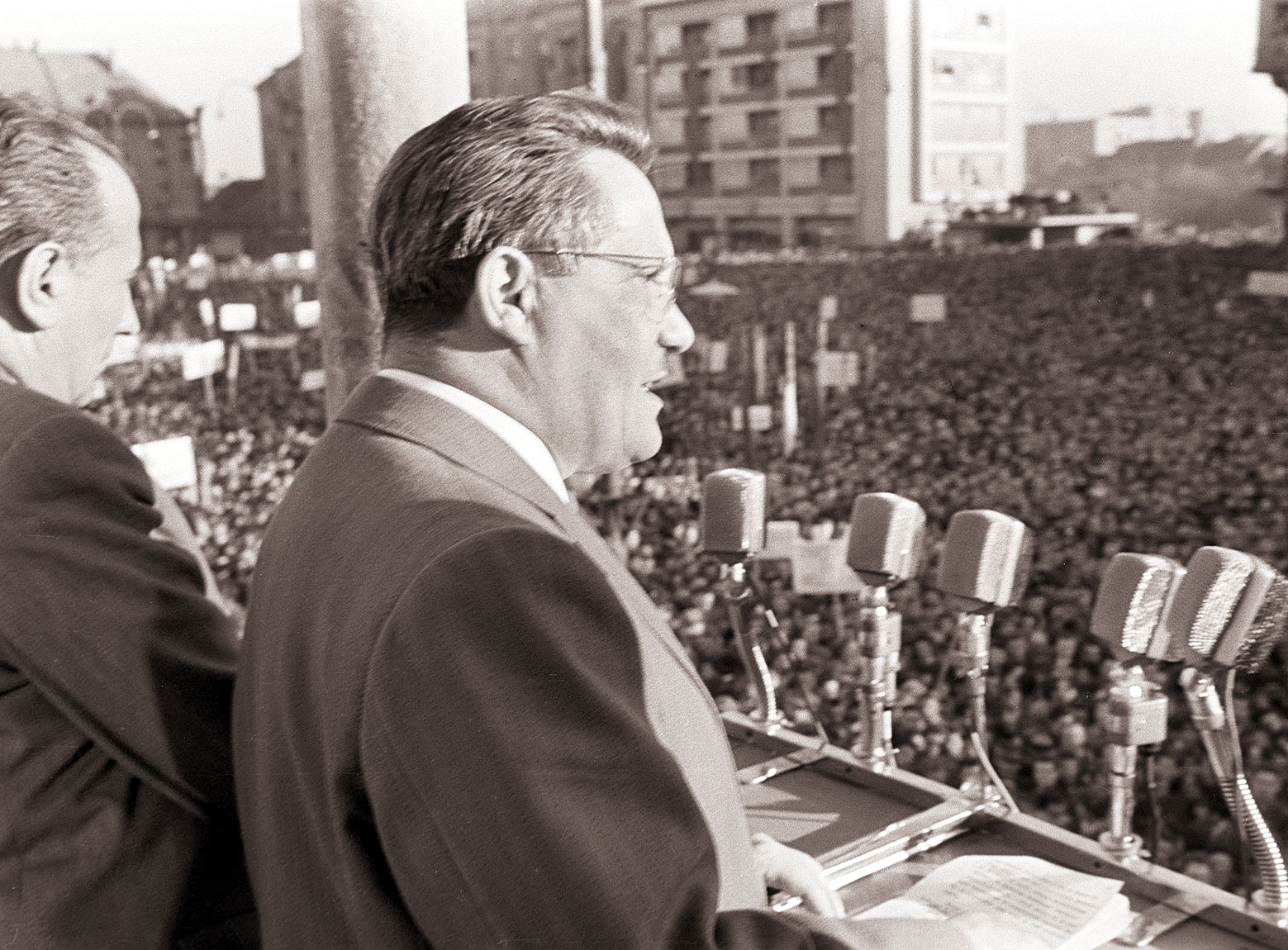 Govor Edvarda Kardelja na zborovanju ob 40-letnici ZKJ in SKOJ v Mariboru.